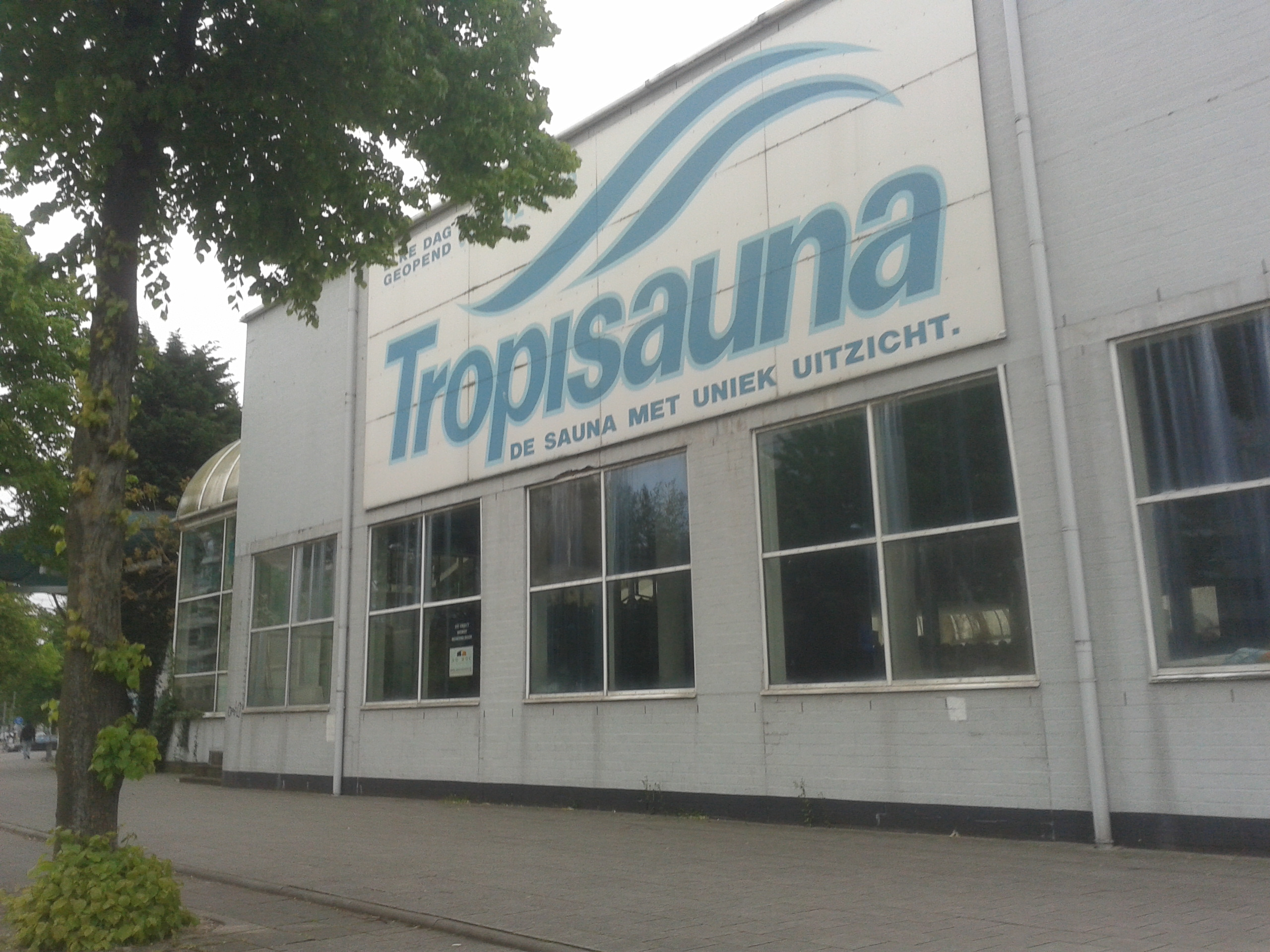 Rotterdam - 2013